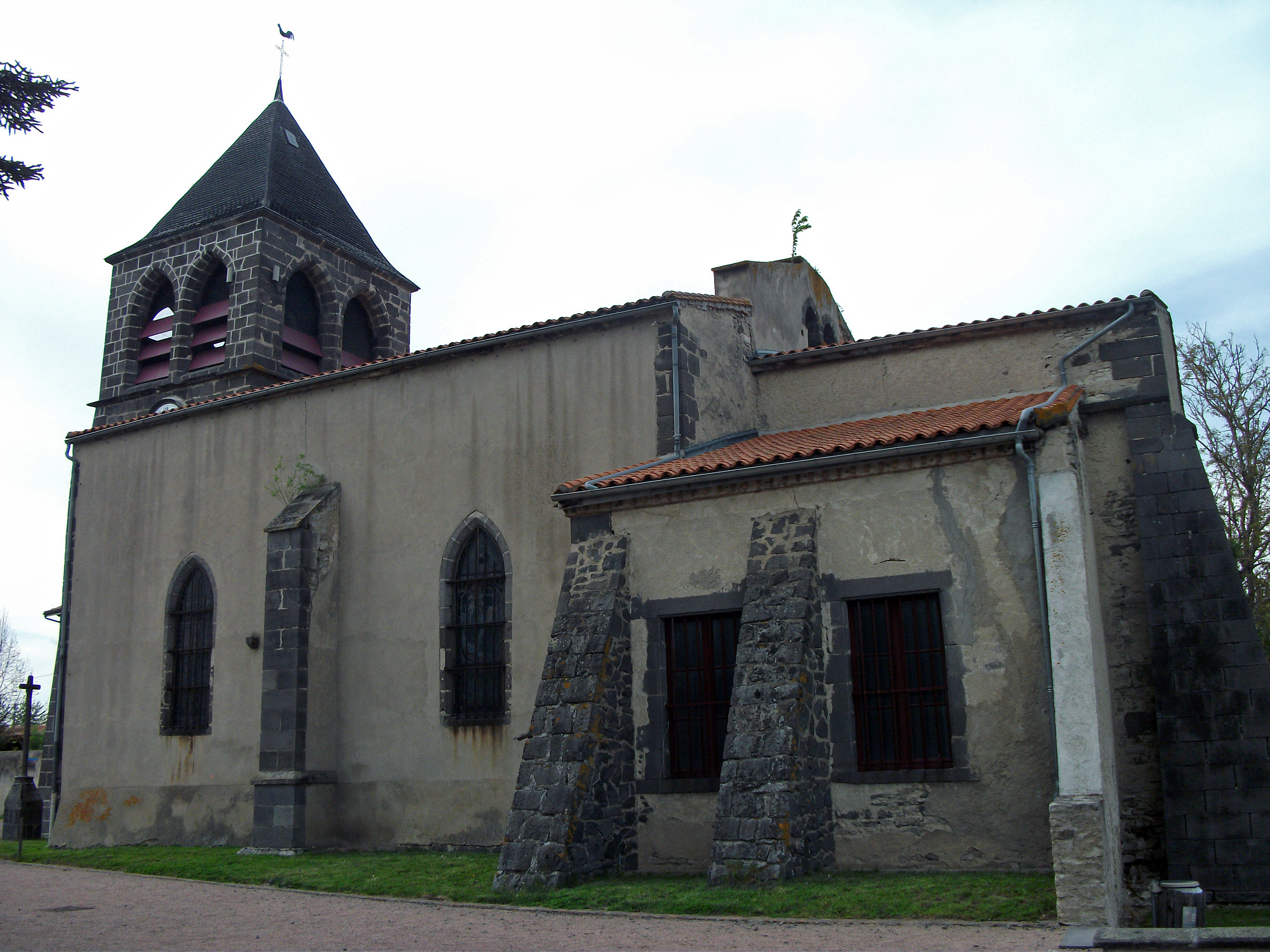 Église à Saint-Laure (Puy-de-Dôme) [10794]